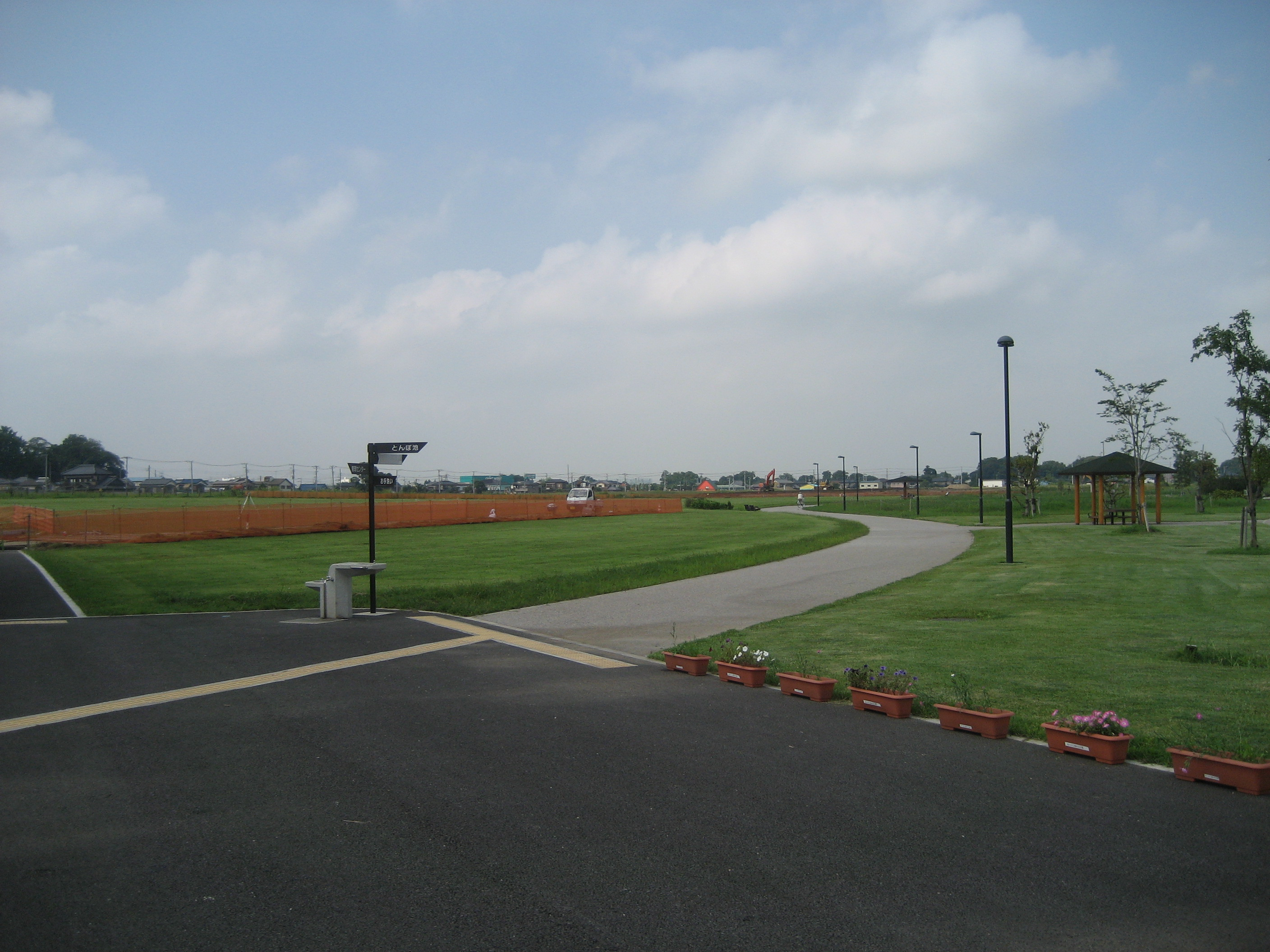 埼玉県営まつぶし緑の丘公園園内